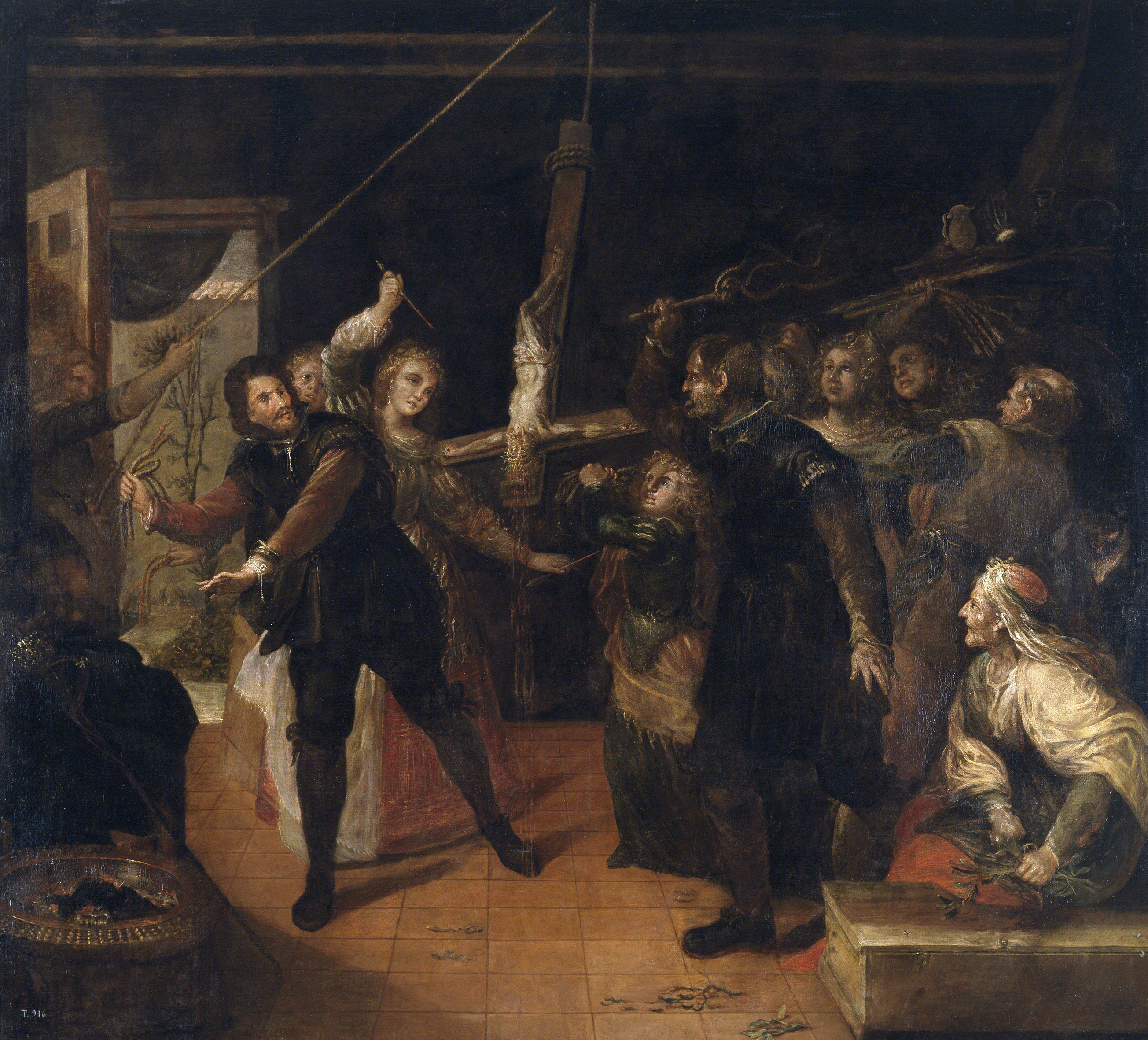 La obra representa a una familia de judaizantes españoles que hacia el año 1630 profanaron en Madrid una imagen de Cristo crufificado, lo que motivó que poco después se levantara en dicha ciudad un templo expiatorio conocido como la capilla del Cristo de la Paciencia.